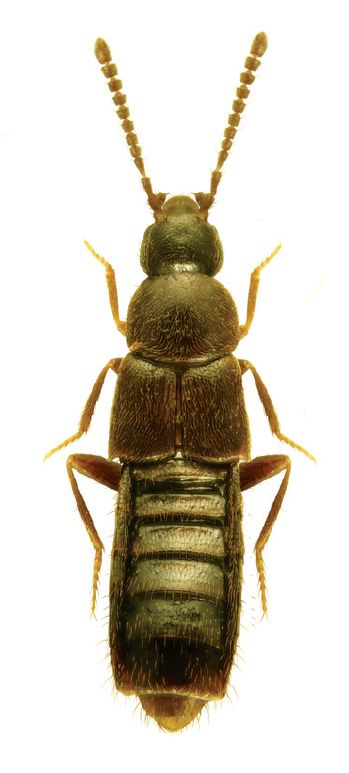 Schistoglossa campbelli